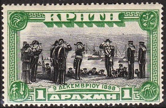 Последняя оригинальная почтовая марка Критского государства